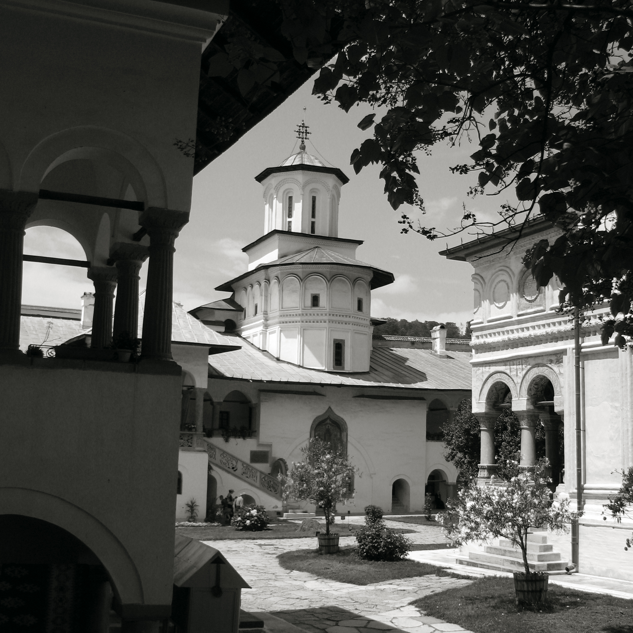 Mânăstirea Hurezi Hurezi Monastery Monastery of Horezu UNESCO World Heritage list